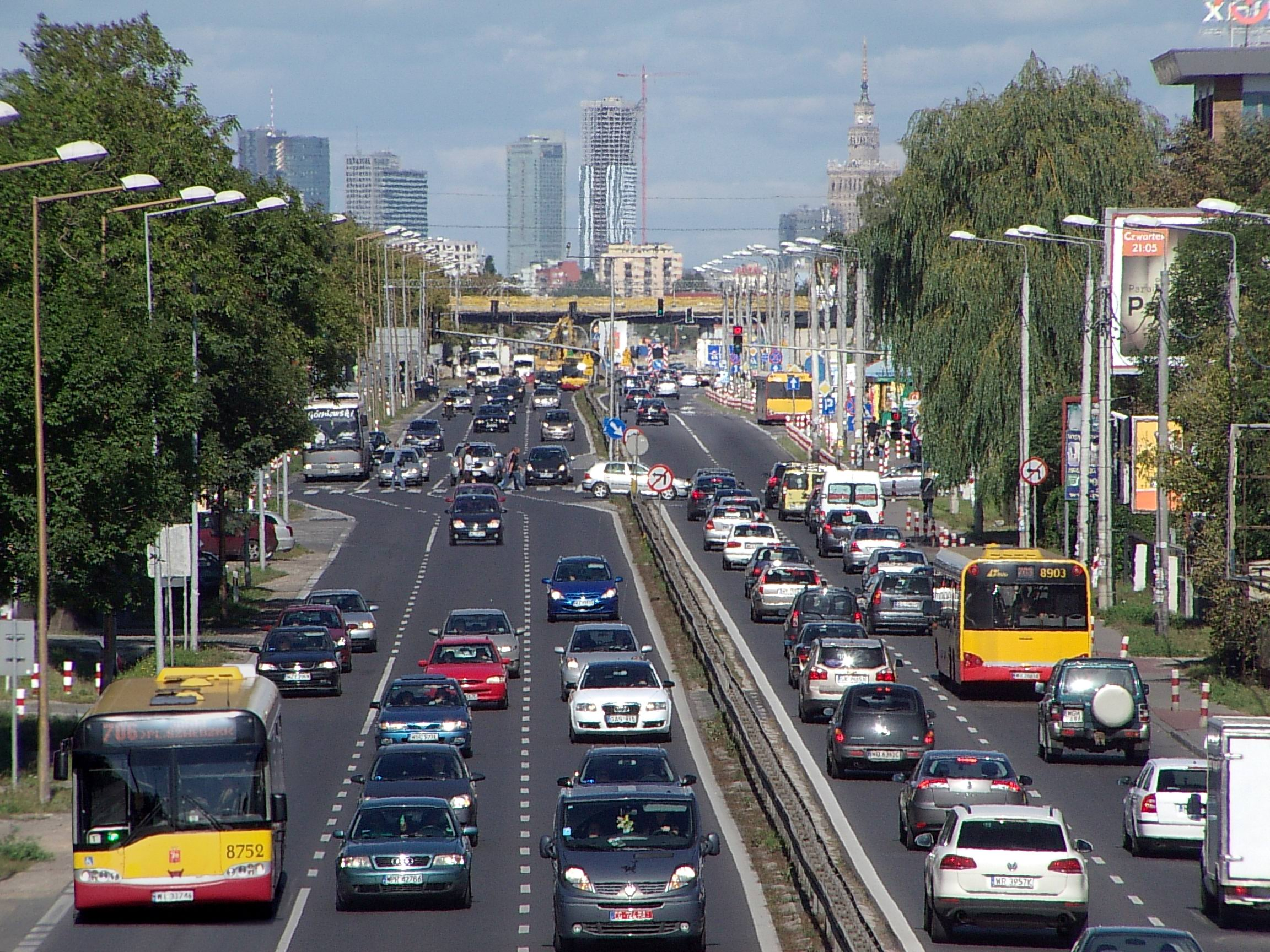 Al. Krakowska - w głębi widoczne Centrum Warszawy